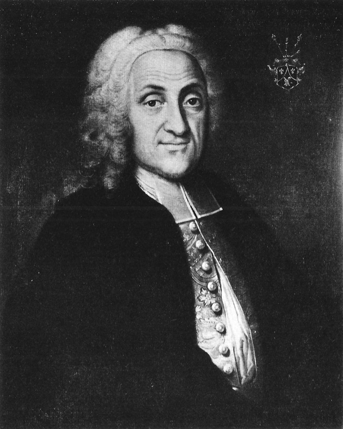 Prof. Wolfgang Adam Schöpf d. J. (Öl auf Leinwand, Tübinger Professorengalerie)